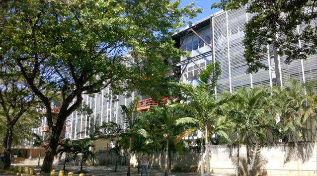 EAC FACES UCV caracas, Venezuela